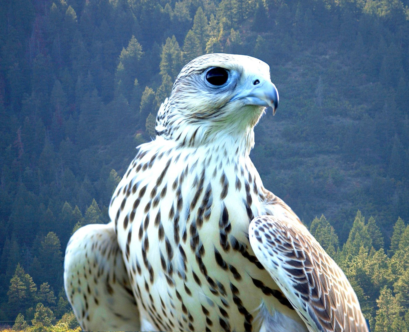 Mischling aus einem weißen Gerfalke (F. rusticolus) und einem Würgefalken (F. cherrug)